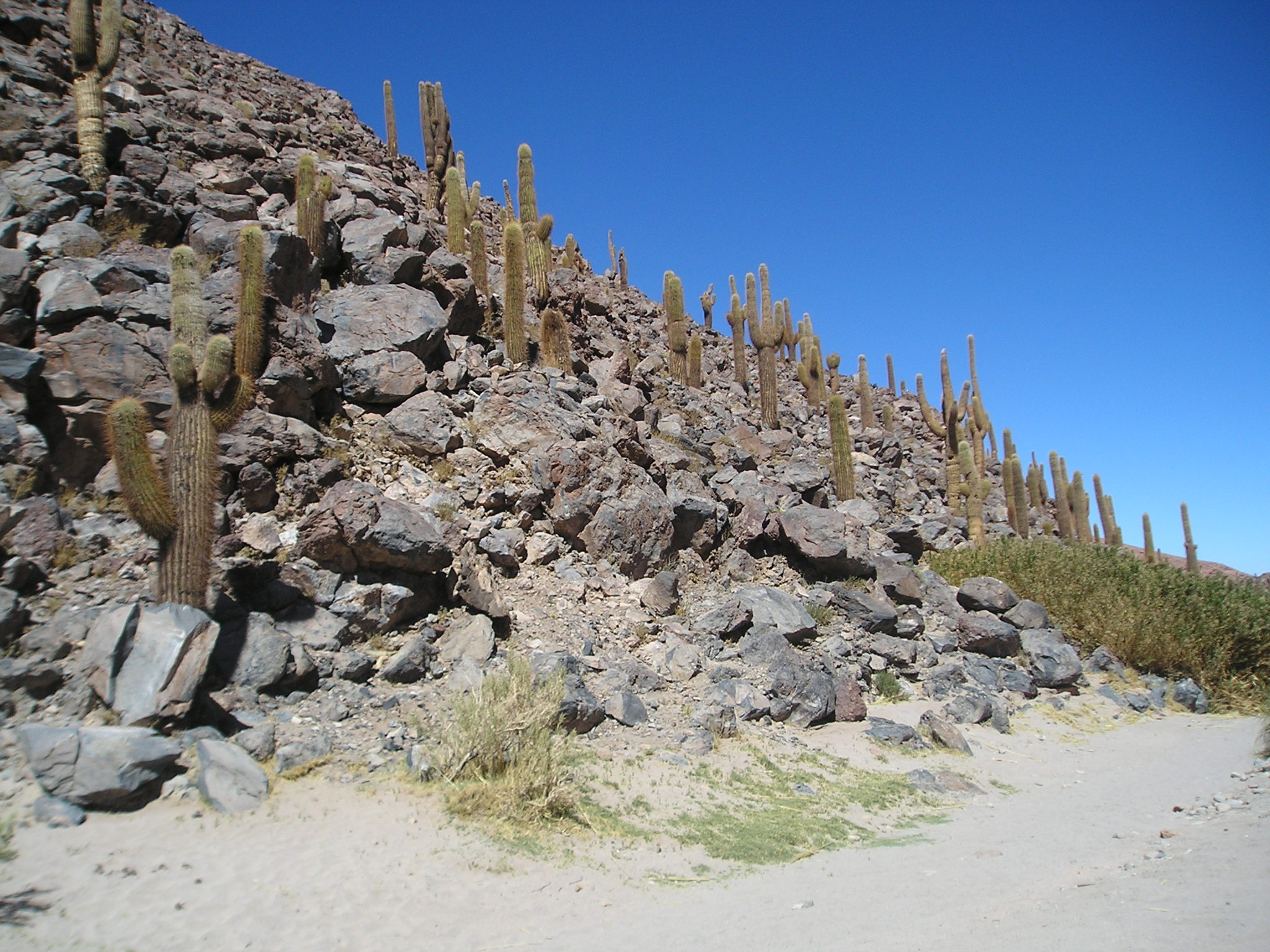 Cardón (Echinopsis atacamensis subsp. atacamensis) forest in Guatín canyon near San Pedro e Ataca,a, Chilean Altiplano